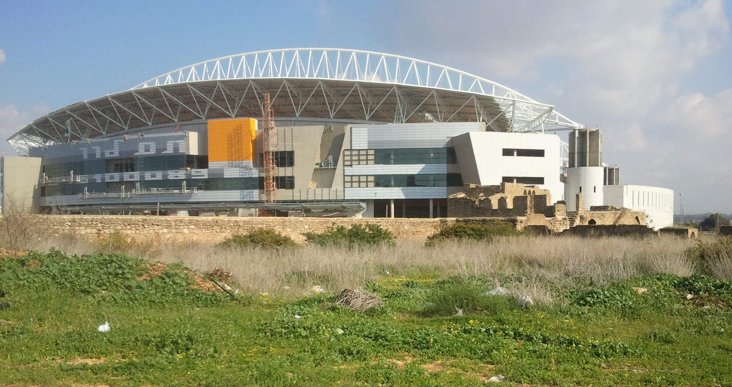 בירכת חנון בנתניה